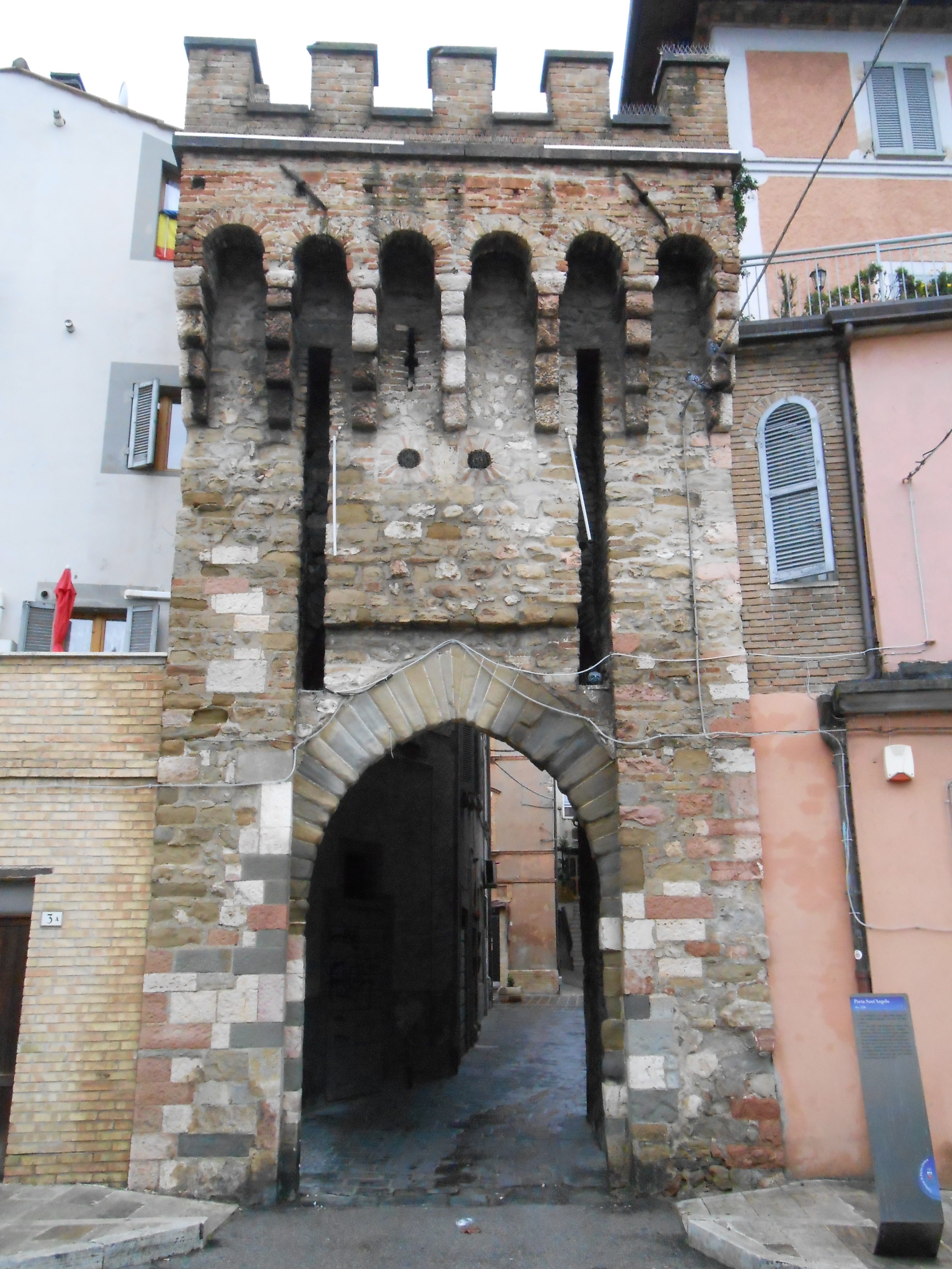 porta Sant'Angelo a Bastia Umbra